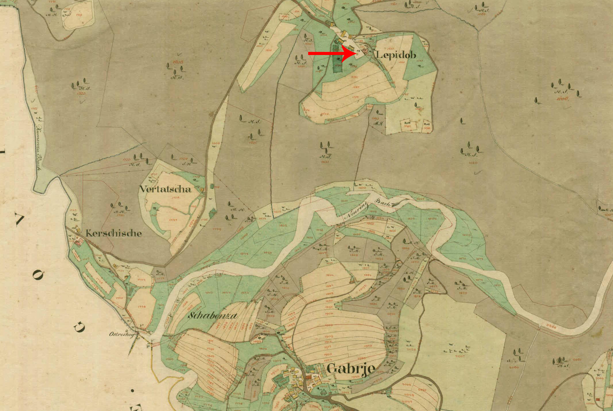 Franciscejski kataster za Kranjsko, 1823-1869